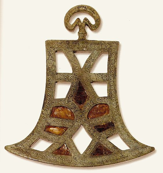 Tintinnabulo. Datazione: fine VIII-inizi VII secolo a.C. Materiale: bronzo ed ambra (cm 17,8 x 17, 3) Provenienza: sepolcreto villanoviano nel podere Comezzano presso Toscanella (località sulla via Emilia a 5 km da Imola). Fotografia tratta da: Imola antica e medievale nella cronachistica cittadina di eta moderna. Andrea Nanetti (a cura di); con i contributi di Matteo Bacci, Andrea Ferri, Francesca Grandi, Marilena Griesi. Imola: La mandragora, 2008.